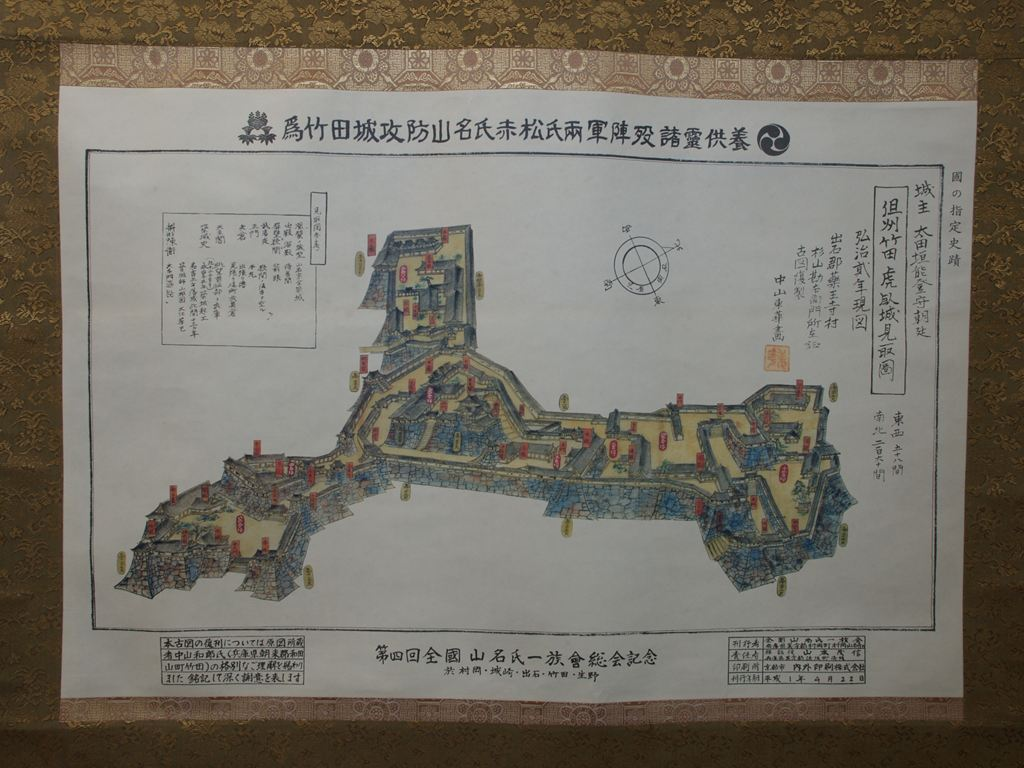 竹田城を描いた見取り図を山名会総会の記念品として発行したもの。